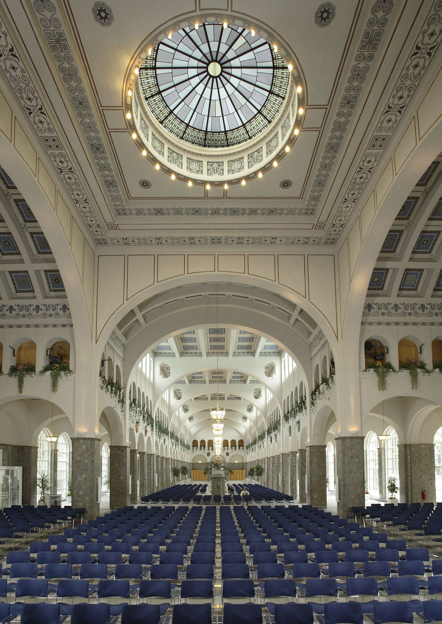 Die Wandelhalle im bayerischen Staatsbad Bad Kissingen, mit 3.240 m² die größte Trinkkurhalle der Welt